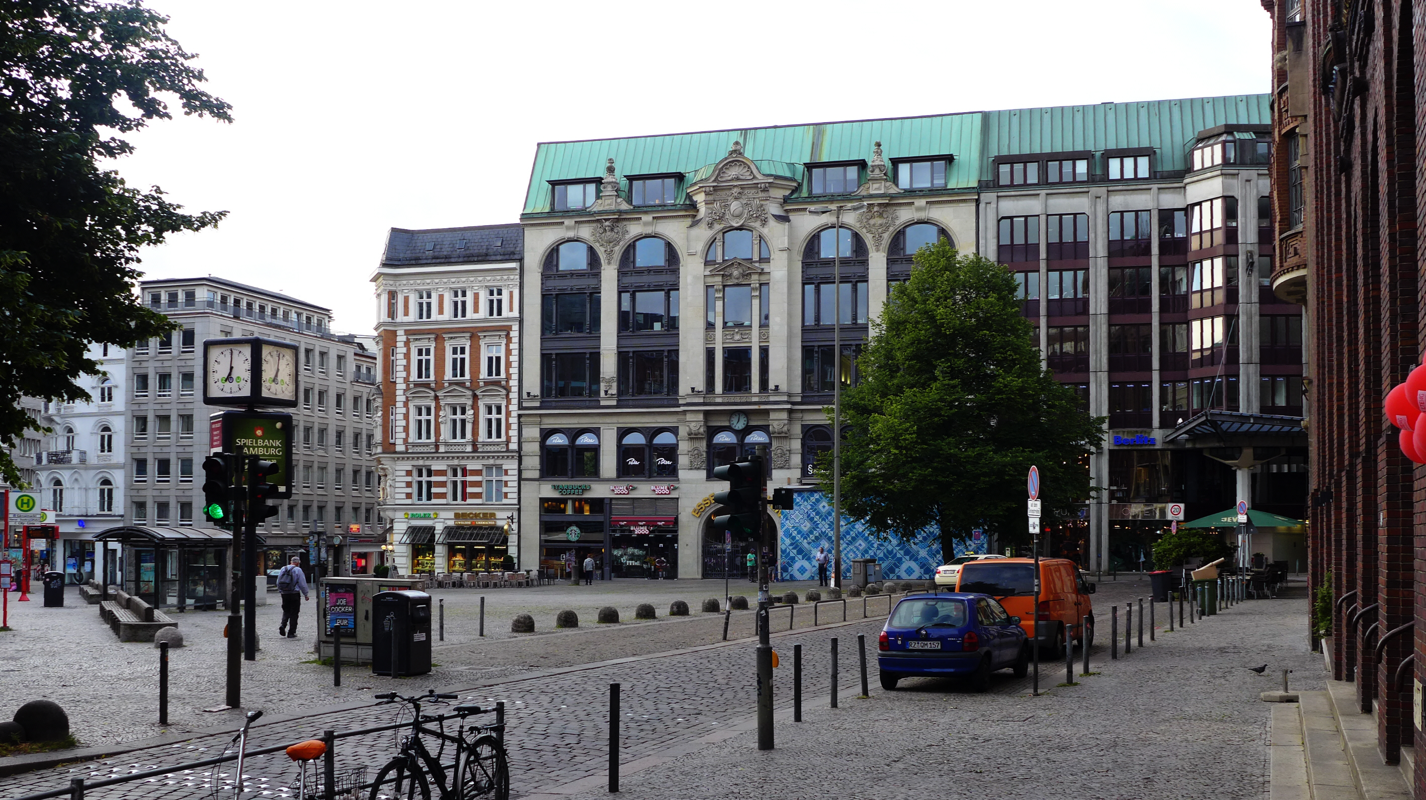 Girardet-Haus (Bildmitte) am Gänsemarkt 21-23, Hamburg. Baujahr 1896, benannt nach dem Verleger Wilhelm Girardet (1838-1918). This is a photograph of an architectural monument.